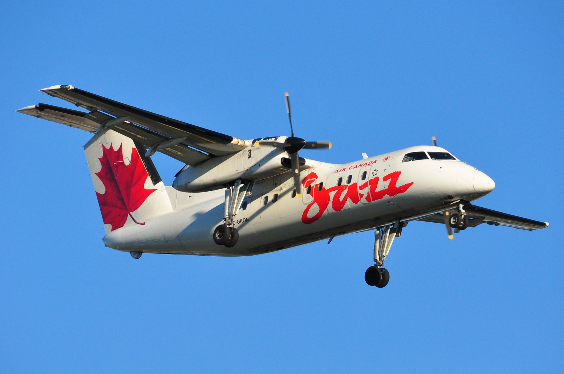 Air Canada Jazz Dash-8 C-GKON